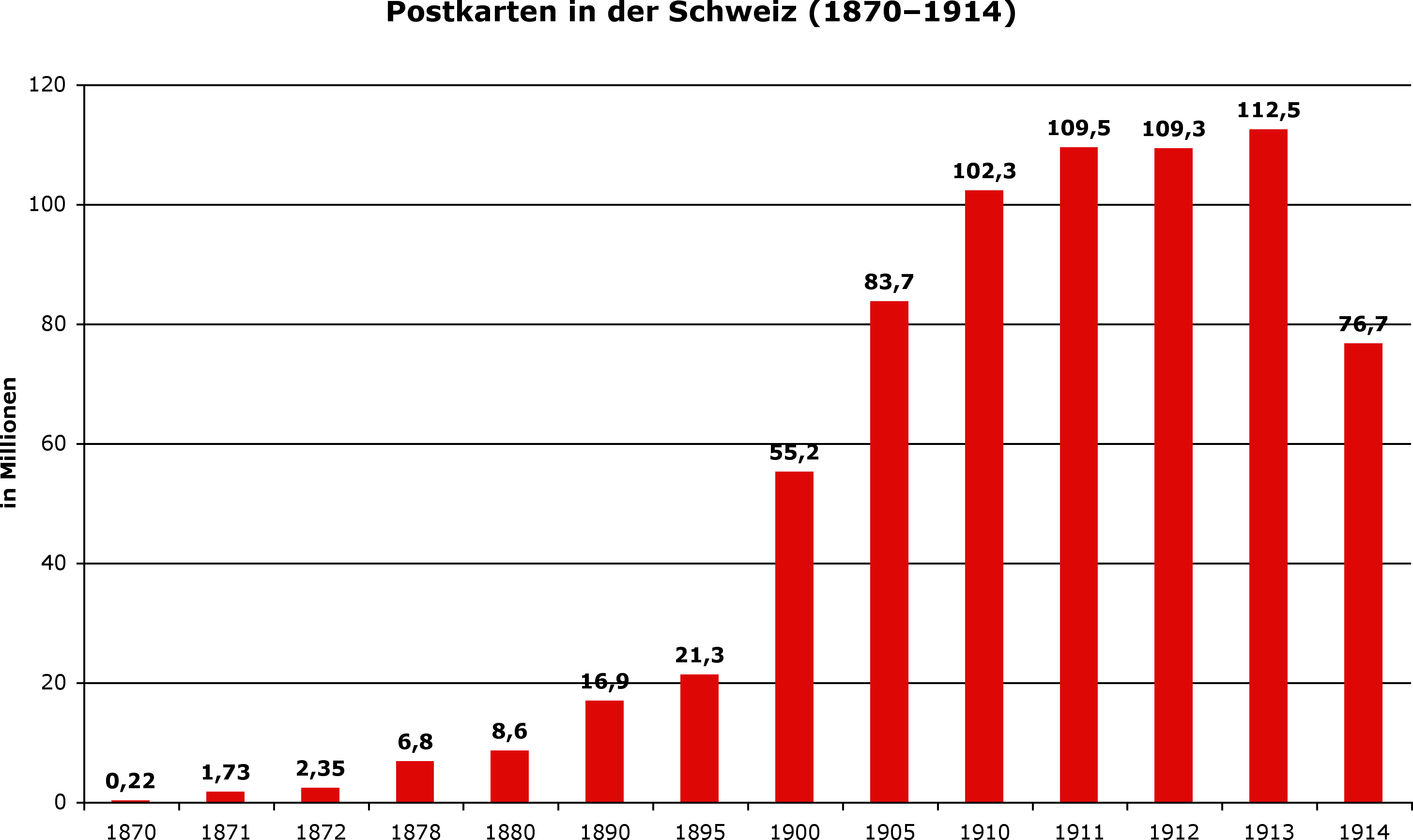 Diagramm der Entwicklung der Postkarte in der Schweiz. Die Zahlen stammen aus dem Artikel Postkarte. Zumstein Spezialkatalog: Die Ganzsachen der Schweiz, Verlag Zumstein & Cie., Bern 2002, Seite 41 Otto Wicki: Geschichte der Post- und Ansichtskarten, Verlag Zumstein & Cie, Bern 1996, Seite 19 f